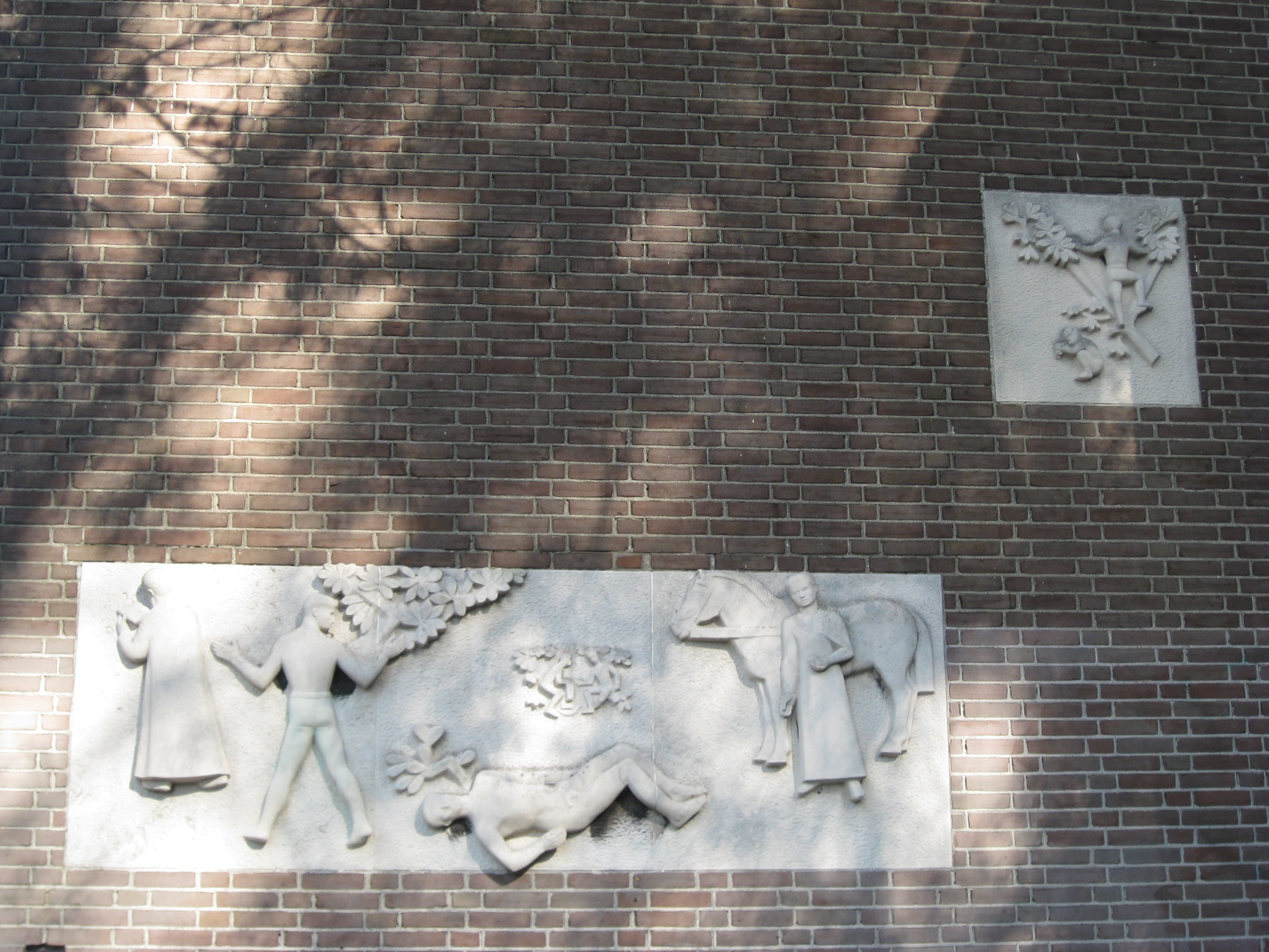 Kunstenaar Han Richters, 1947, Wingerdweg, Amsterdam Noord